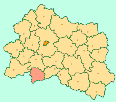 Orel Oblast map by Al Silonov Карта районов Орловской области